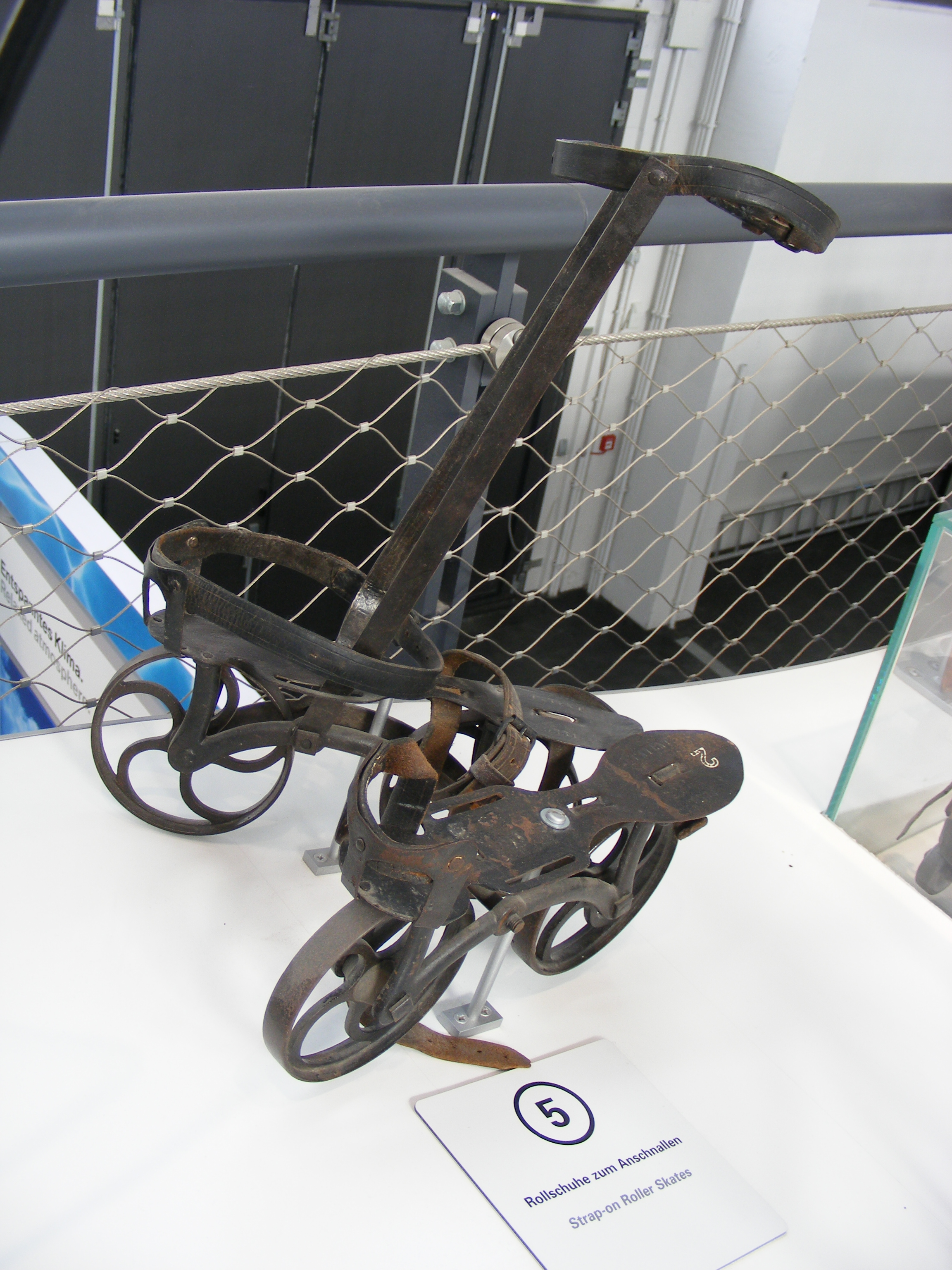 Antiquierte Rollschule zum Anschnallen aus Eisen, Exponat im Deutschen Museum Verkehrszentrum - Halle III.